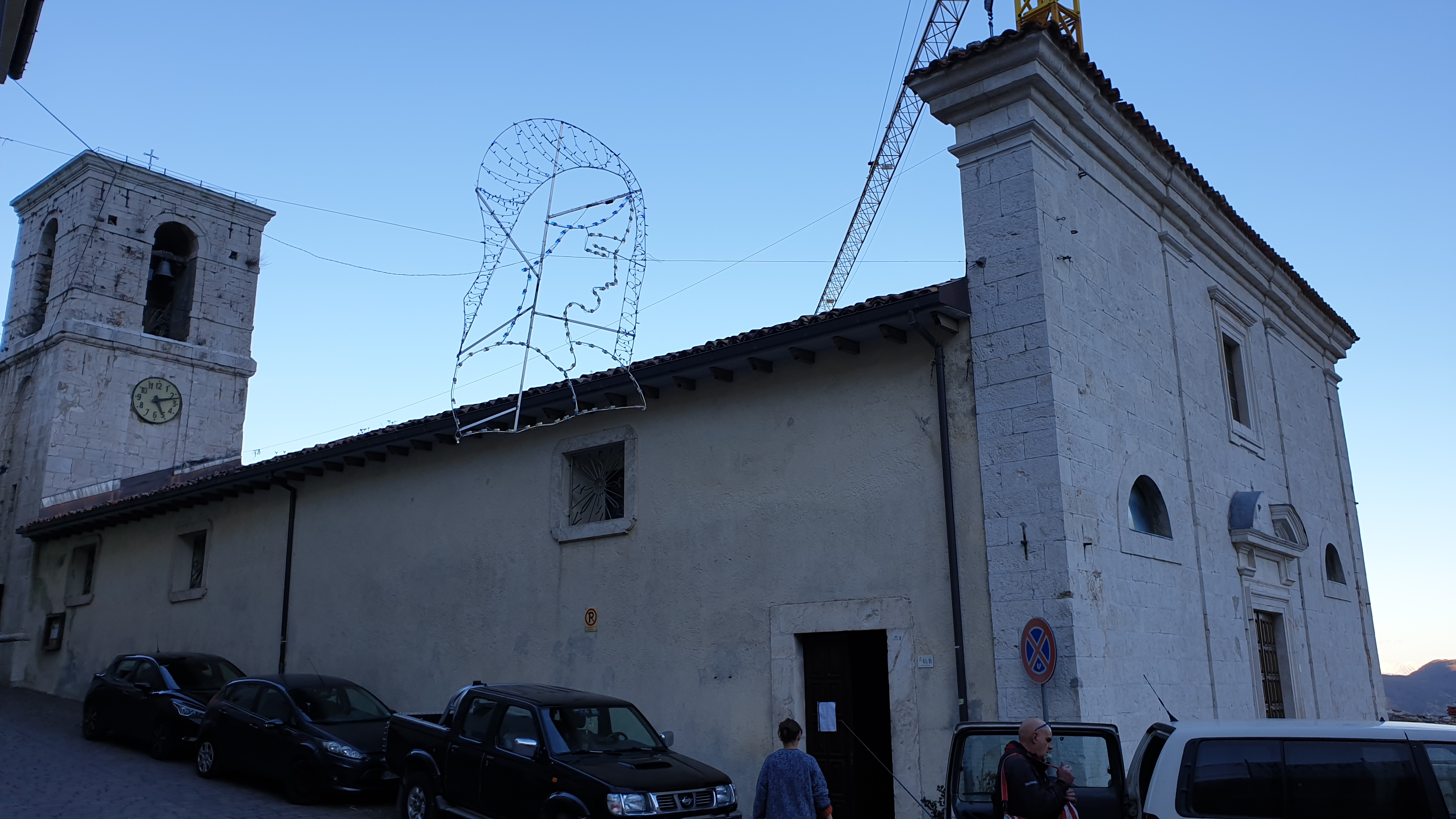 Chiesa dell'Annunziata (Rocca di Cambio)